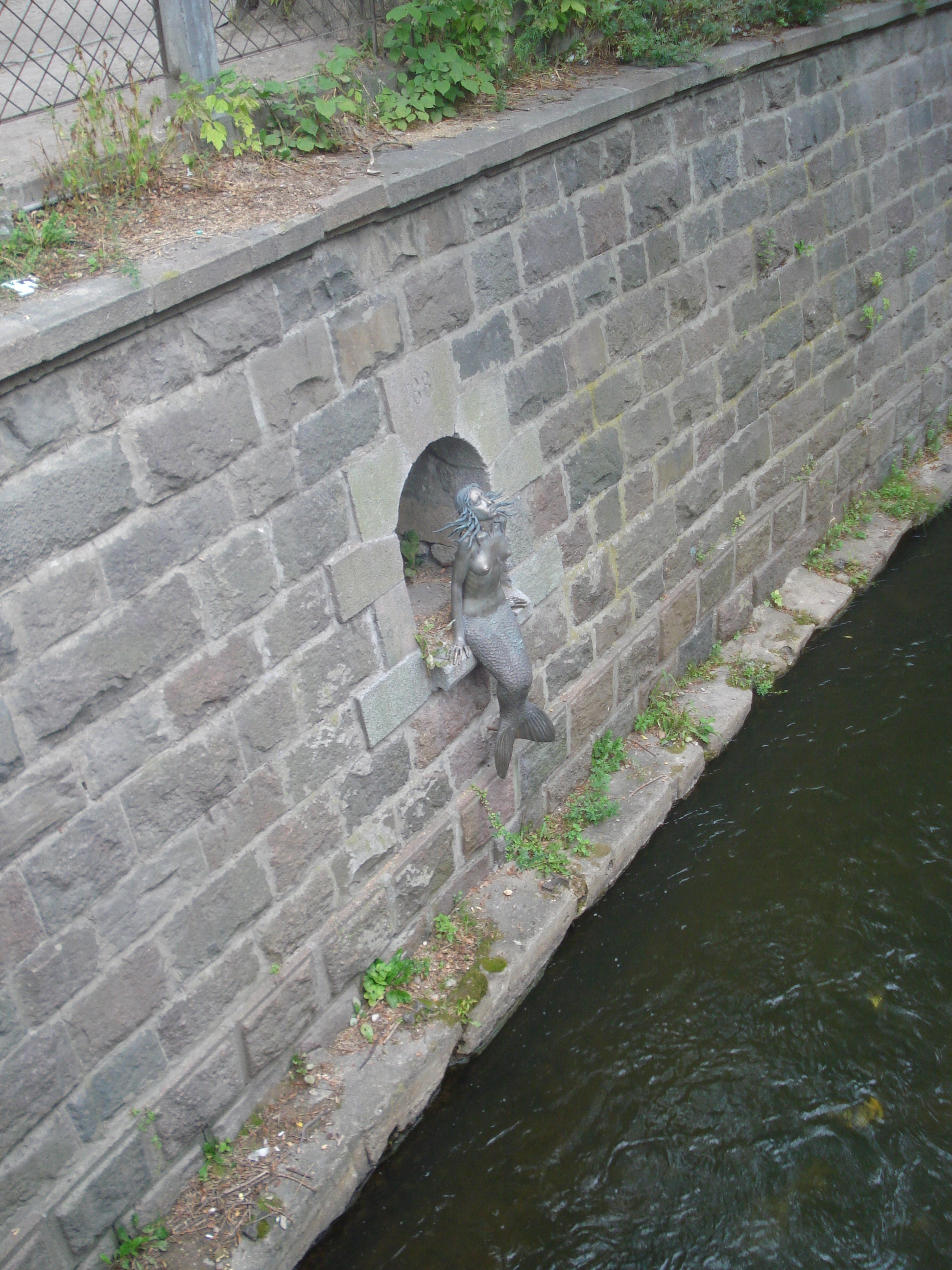 Užupis undine by sculptor Romas Vilčiauskas (born 1966) in Vilnius. 2002